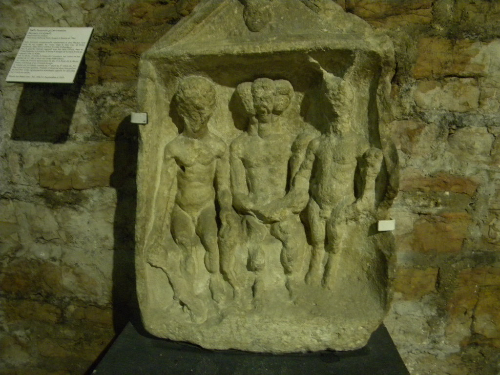 Trikapa Hermeso en belarta muzeo de Bono